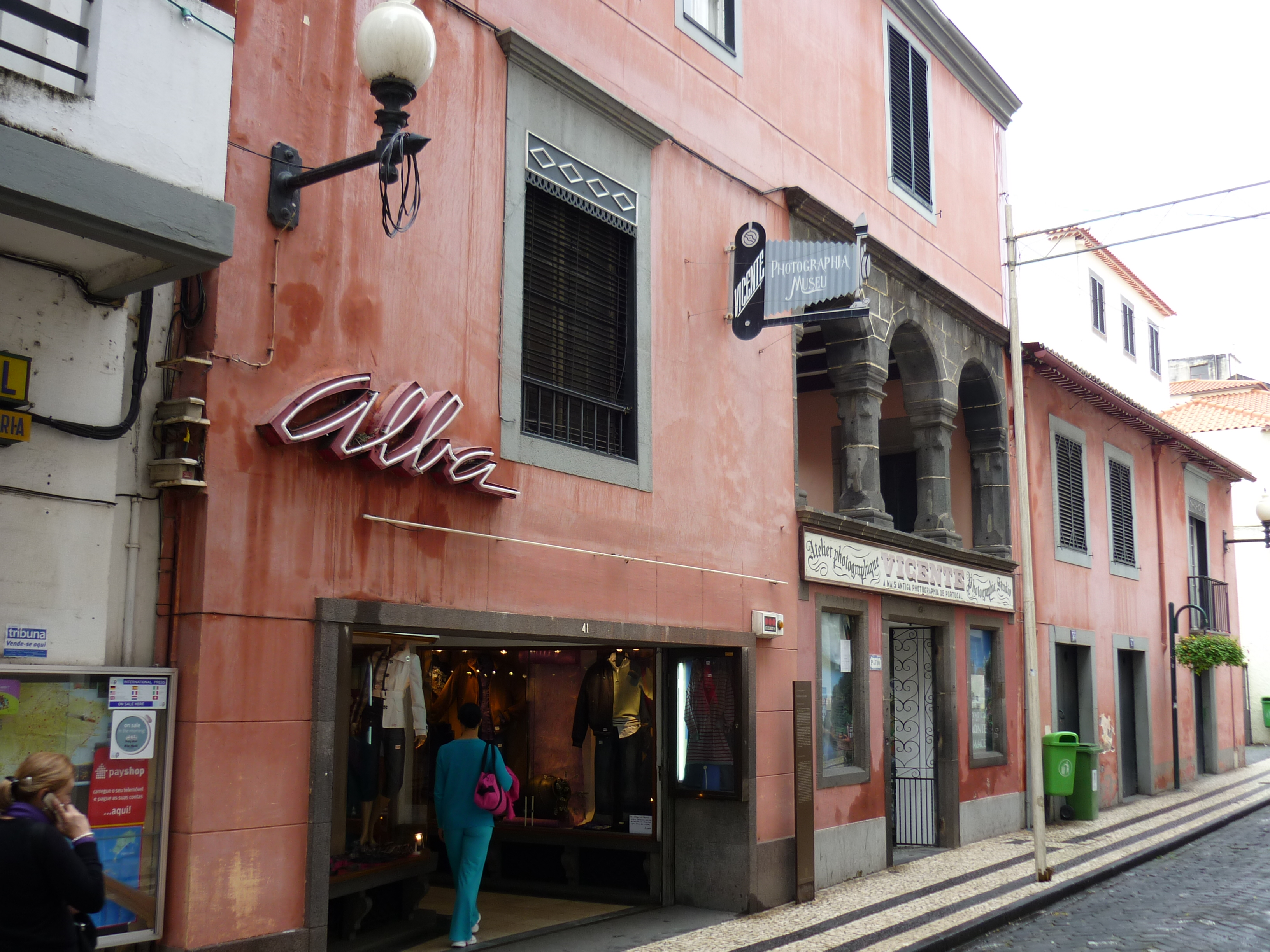 A Photographia Museu Vicentes fényképészeti múzeum épülete Funchalban (Madeira)